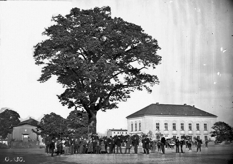 festningsplassen, Den gamle logen, Det kongelige ridehus